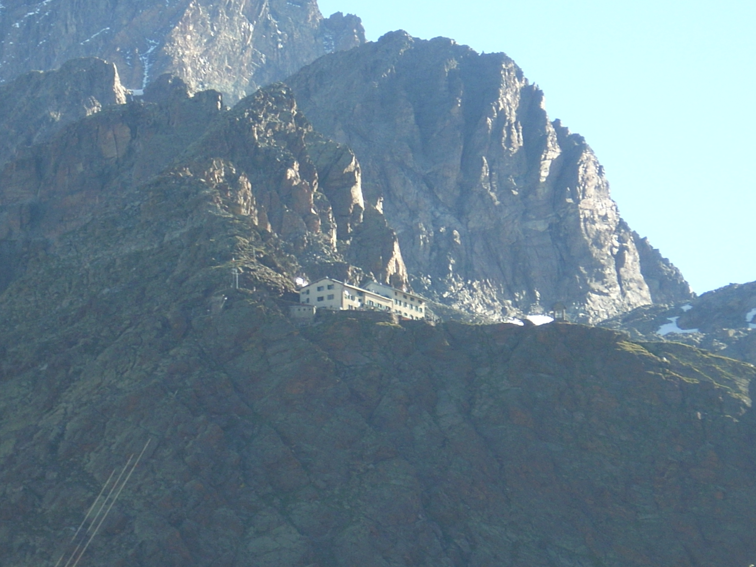 RIF MARINELLI